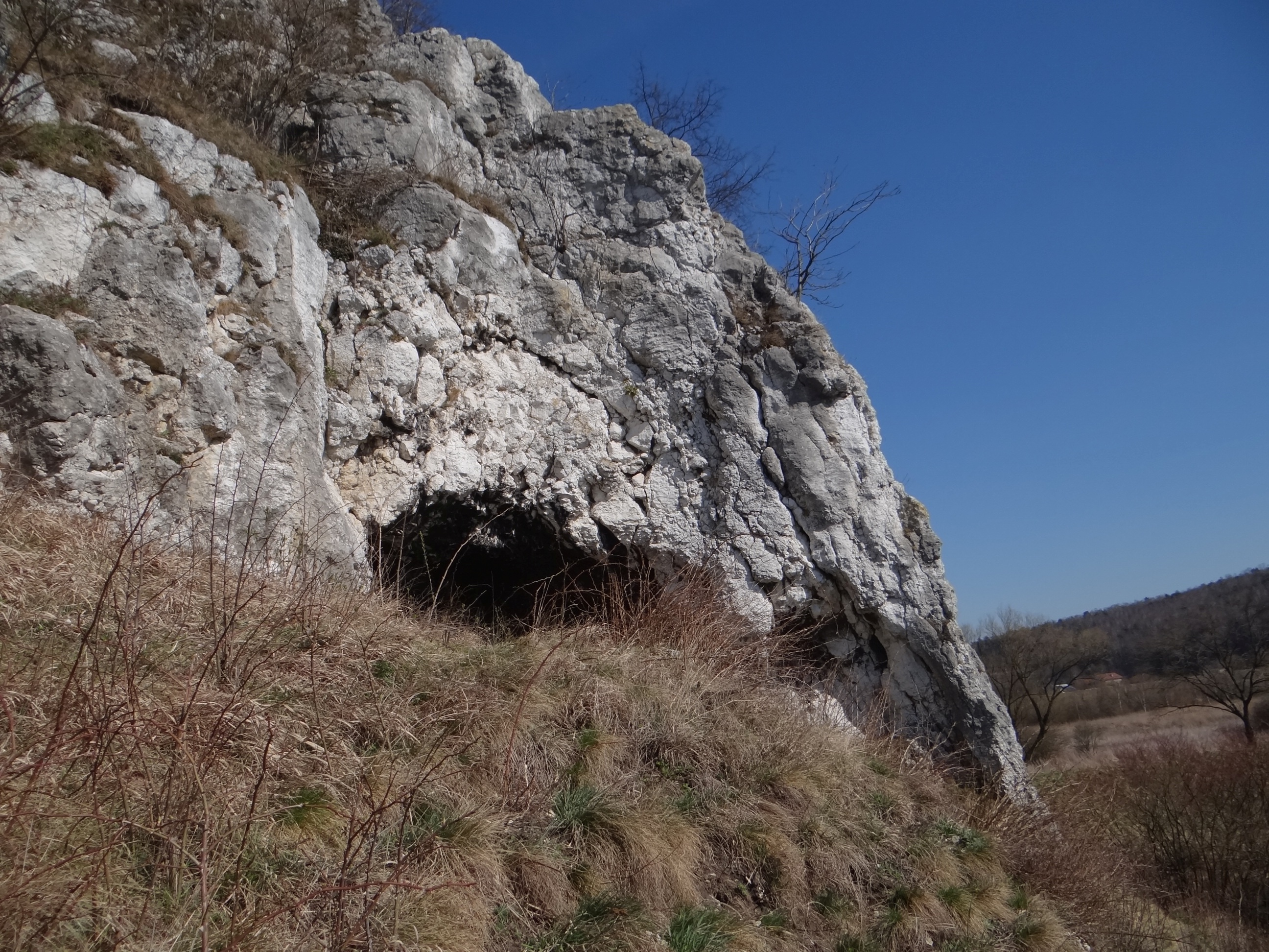 Jaskinia na Gołąbcu